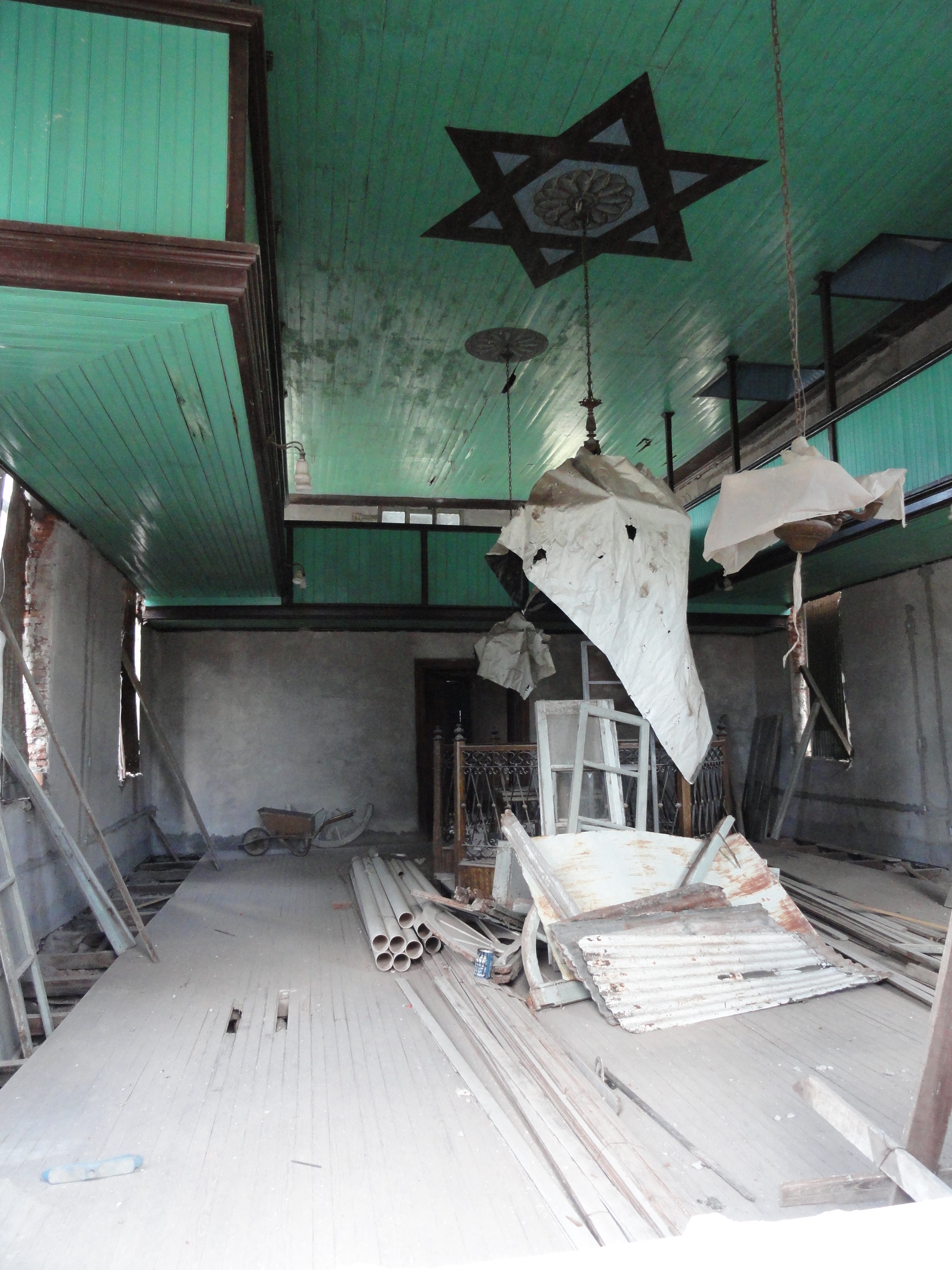 Synagogue Brenner under restoration; Moisés Ville, Argentina